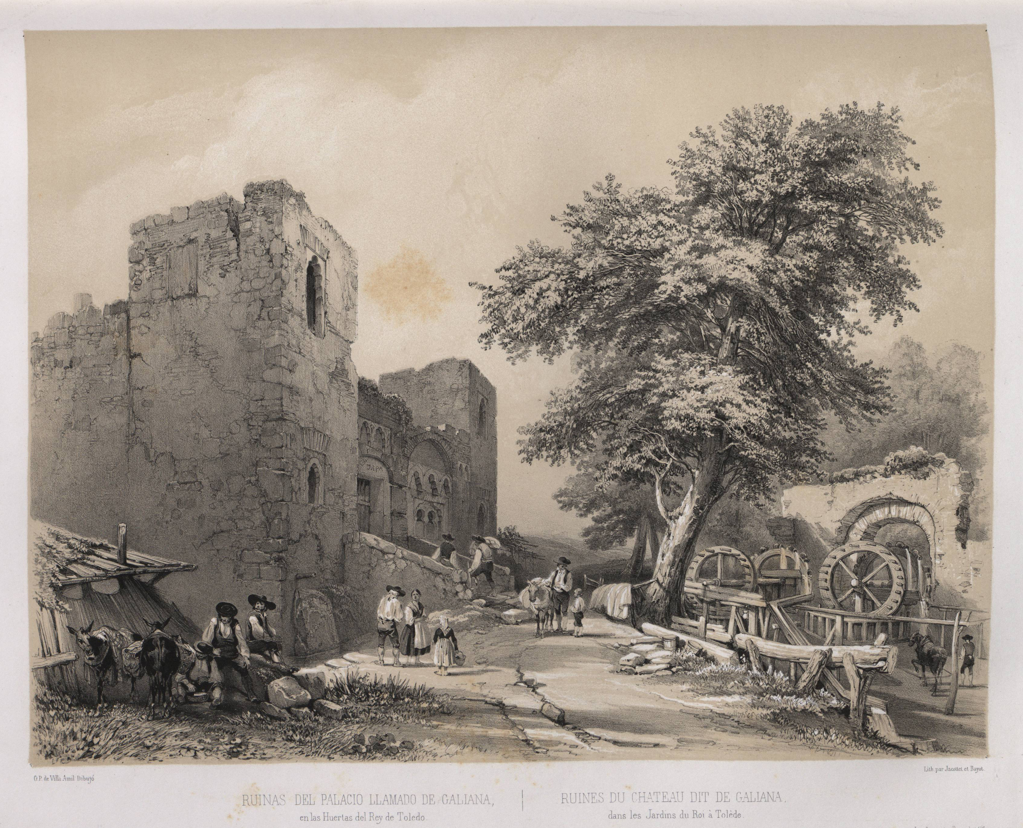 Ruinas del palacio llamado de Galiana en las Huertas del Rey de Toledo.